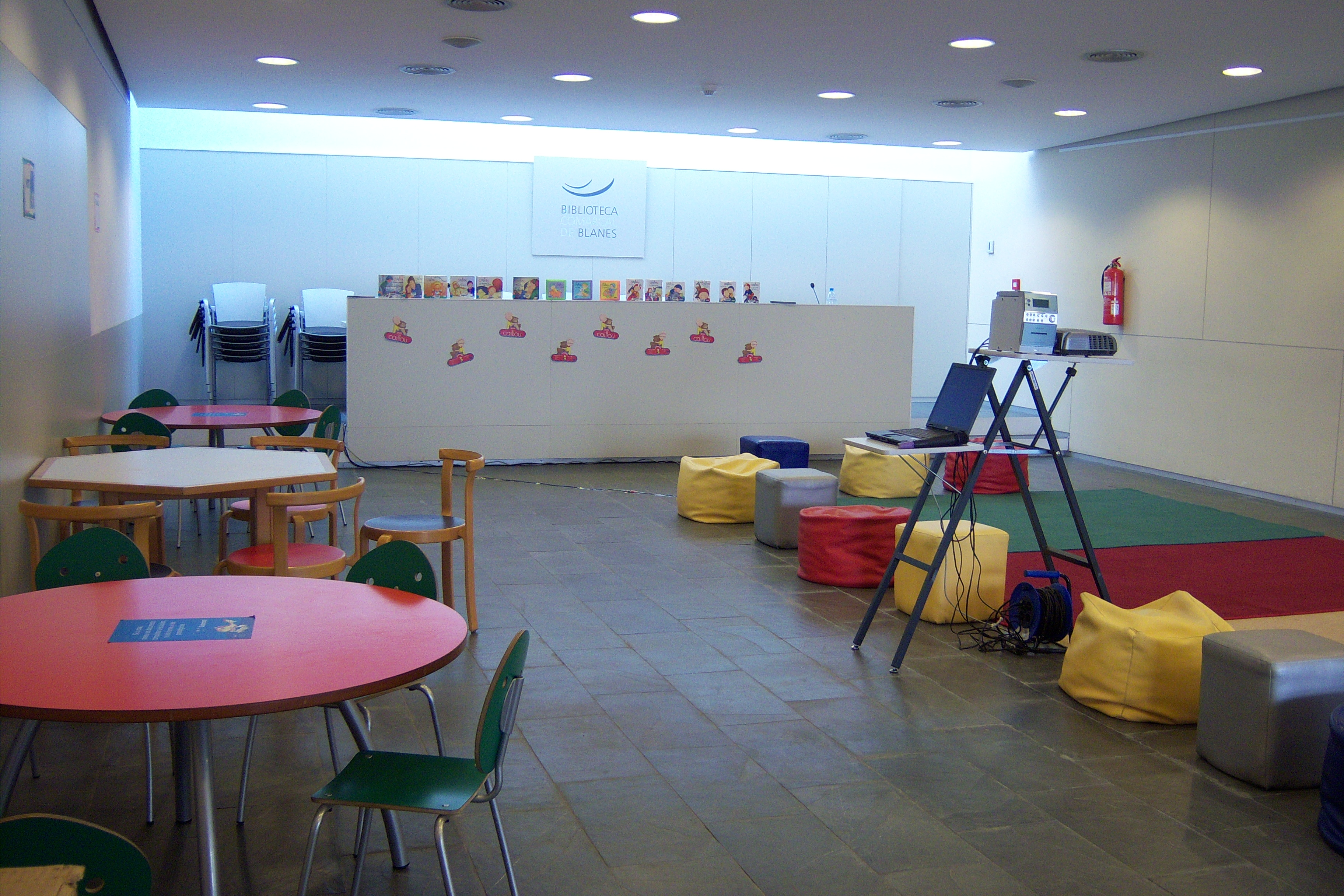 Sala Roberto Bolaño dins de la Biblioteca Comarcal de Blanes, preparada per a una activitat destinada al públic infantil.